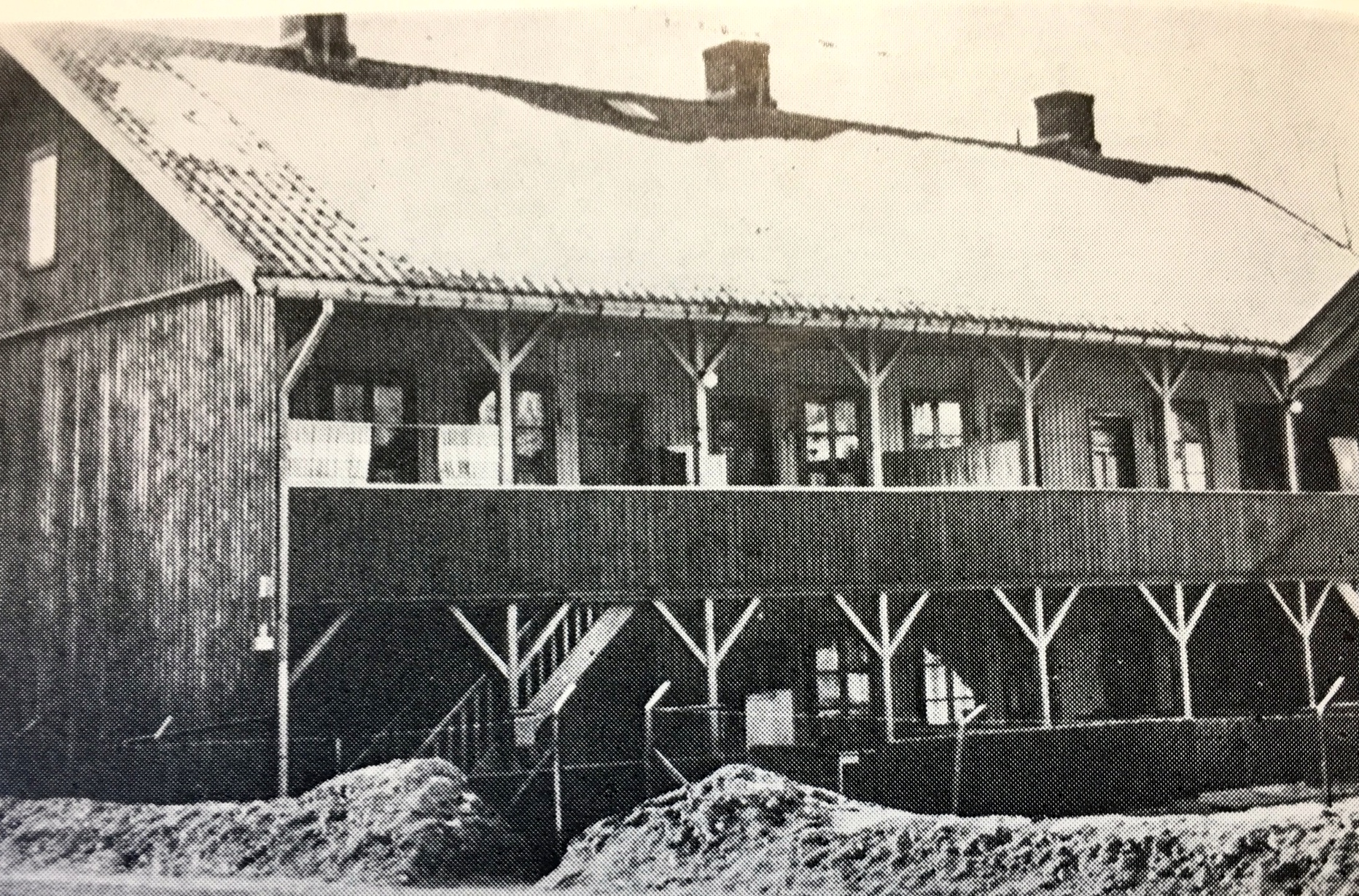 Gjøvikboligen var den andre av arbeiderboligene som Mustad Fabrikker bygget på Lilleaker.